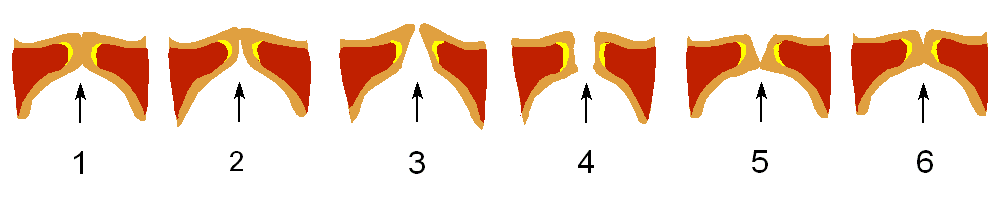 Glottal Cycle